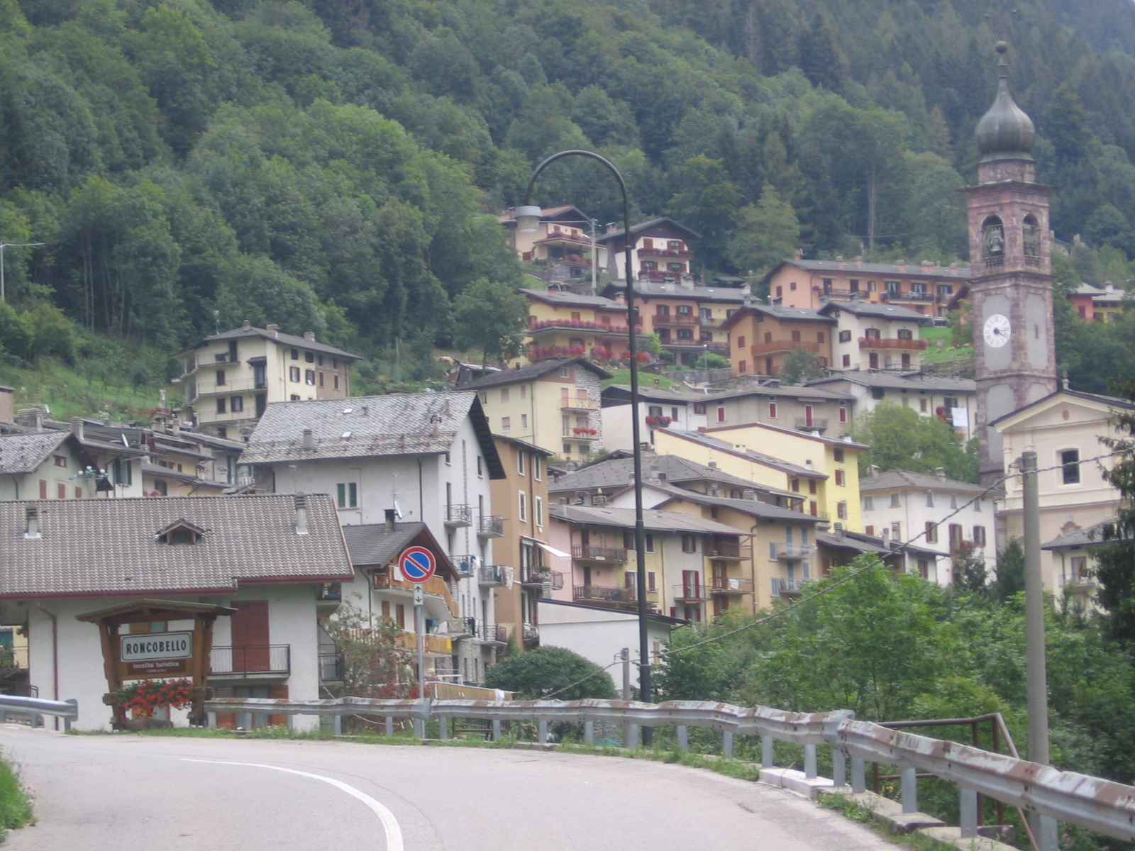 Roncobello, Bergamo, Italy